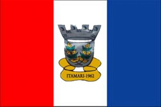 Bandeira do município de Itamari